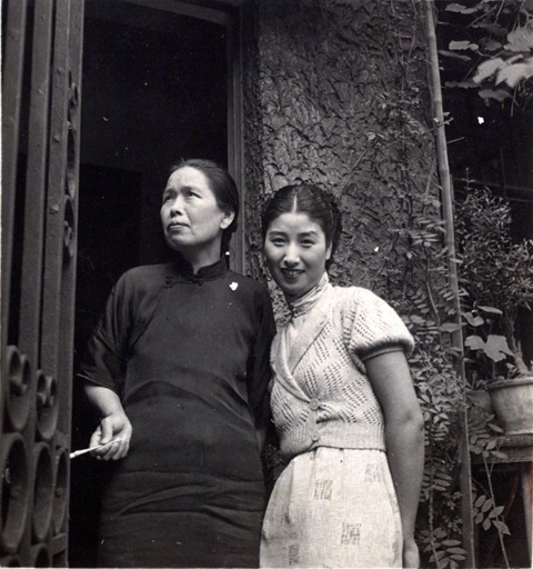 Zheng Pingru and her mother (郑华君女士(木村花子))